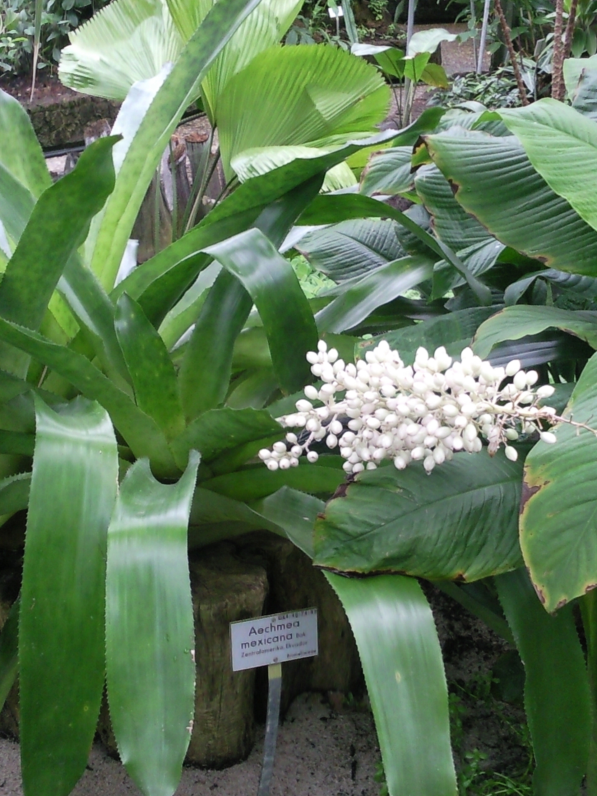 Aechmea mexicana; aufgenommen im Botanischen Garten Berlin